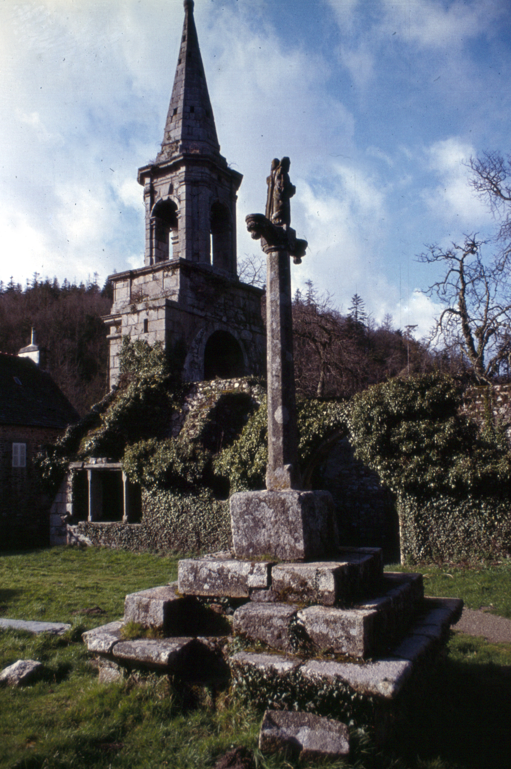 Plounéventer